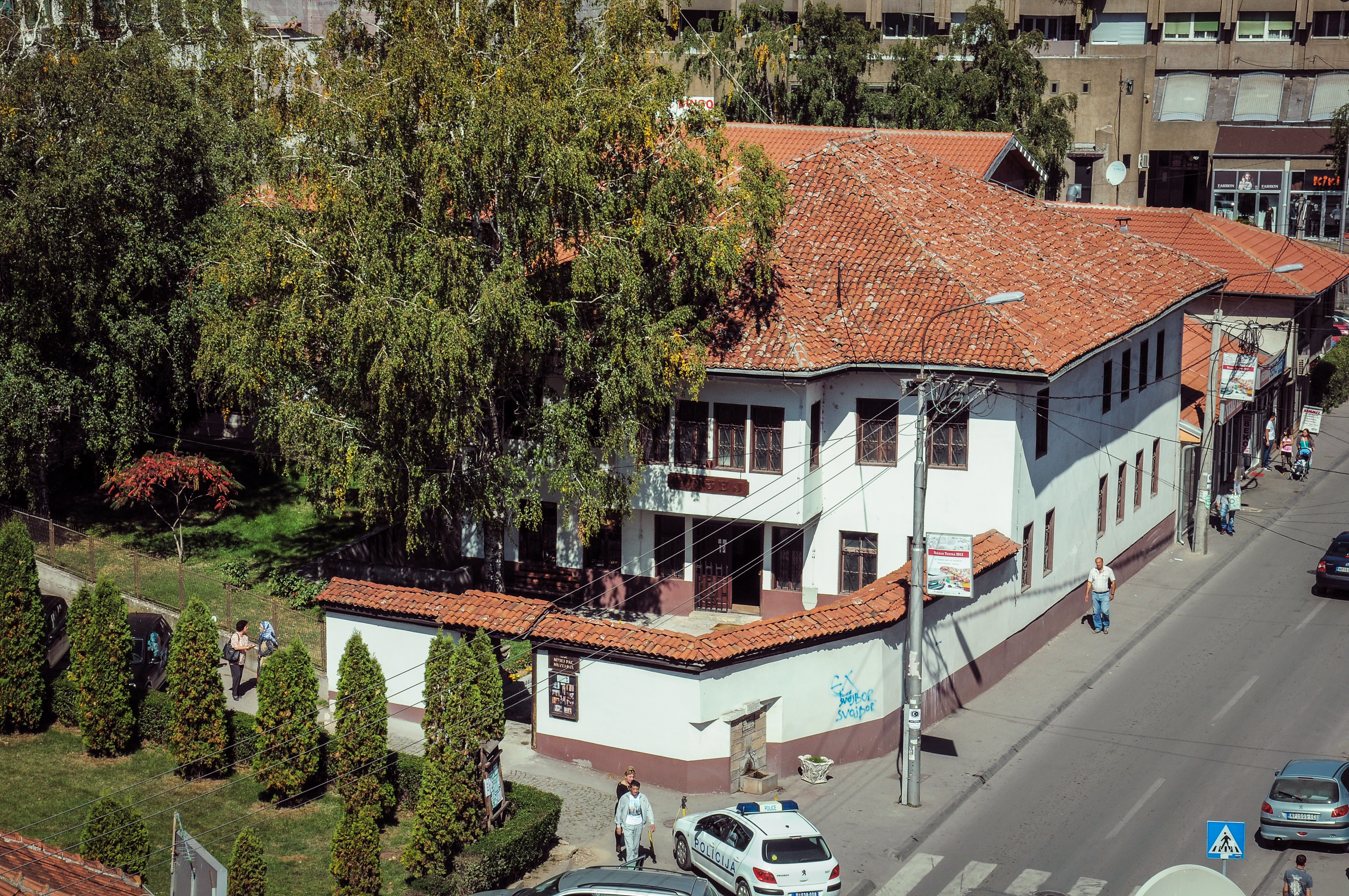 Зграда Музеја „Рас“